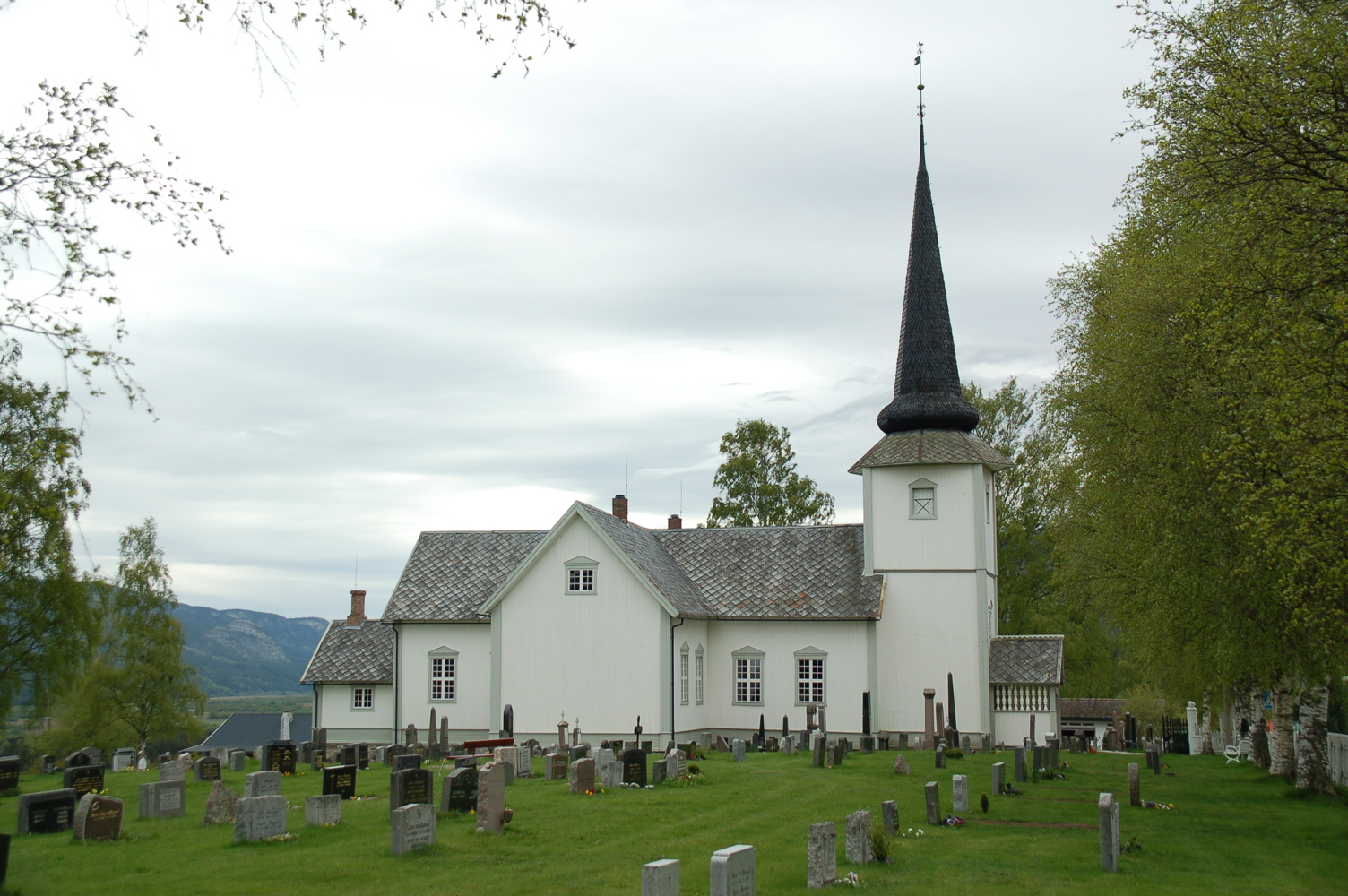 Øvre Rendal Church, Rendalen, Hedmark, Norway